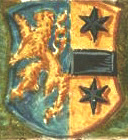 Stammwappen derer von Türckheim - hier Wappen des Nikolaus von Dürckheim - 1588, Pfleger der Kartause Straßburg